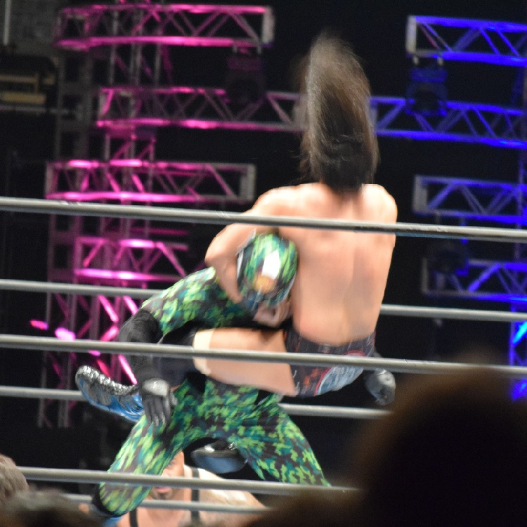 2015年8月1日 大阪府立体育会館 「G1 CLIMAX 25」 キャプテン・ニュージャパンにヴェレノを放つタマ・トンガ